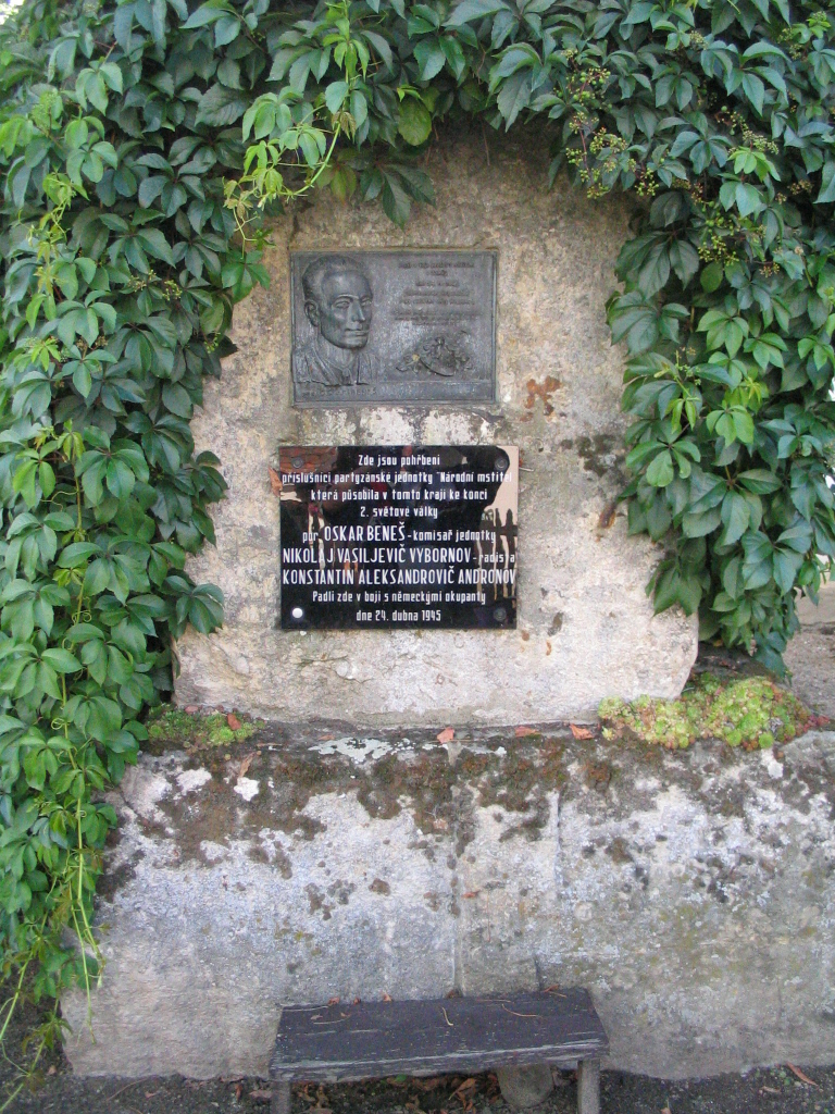 Pomník a hrob komisaře O. Beneše (Zahájí), pod návsí u cesty, Zahájí